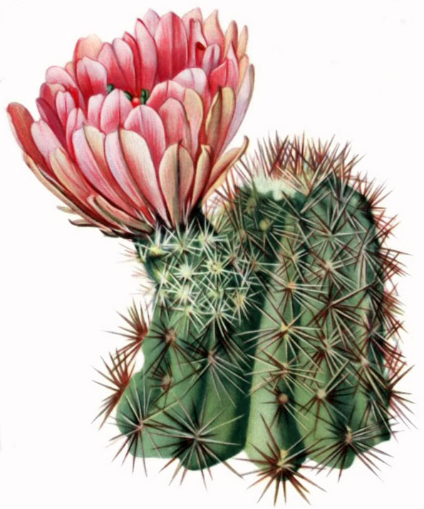 Echinocereus lloydii (now Echinocereus x roetteri)